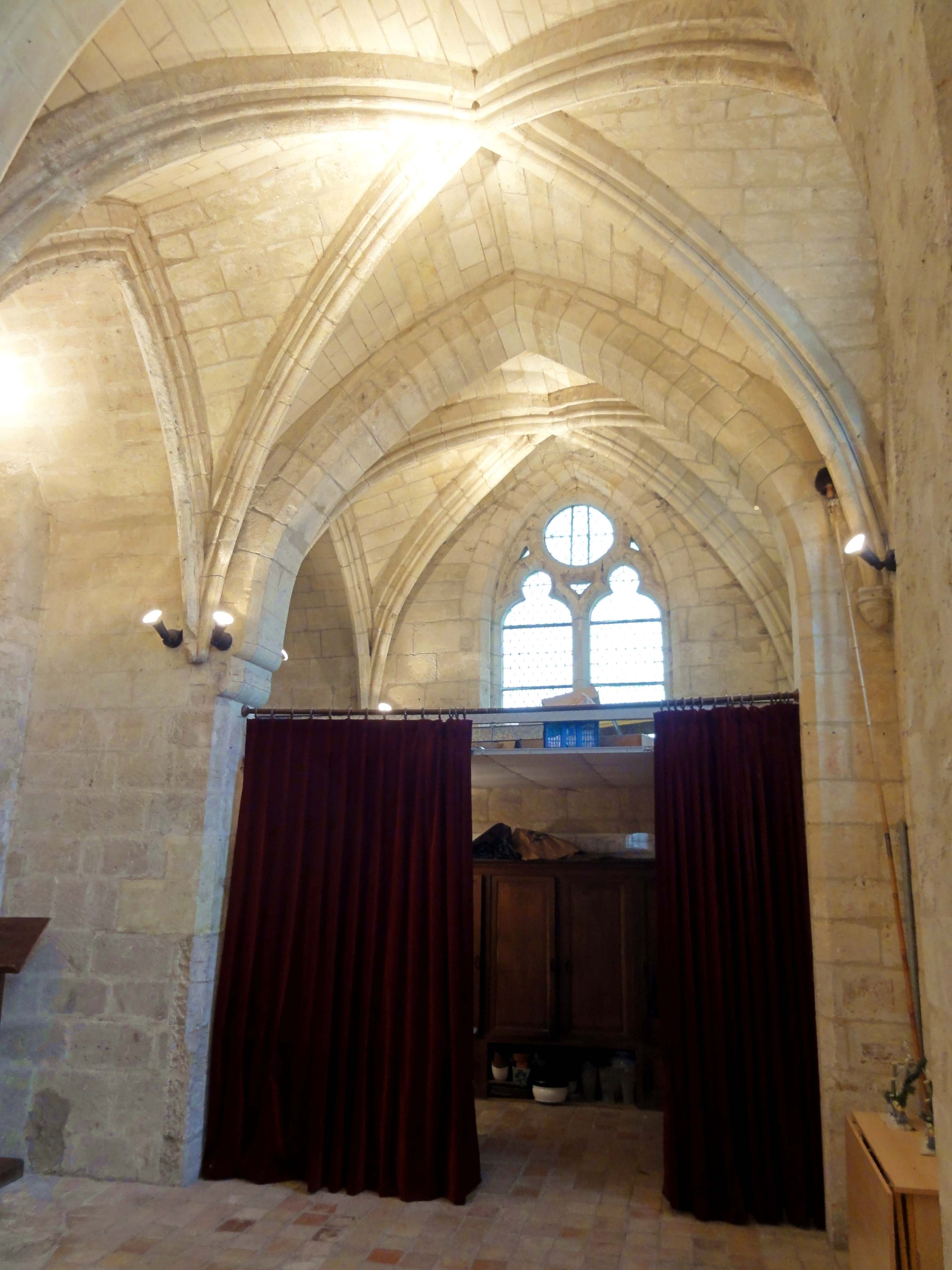 Chapelle nord, vue vers le nord.